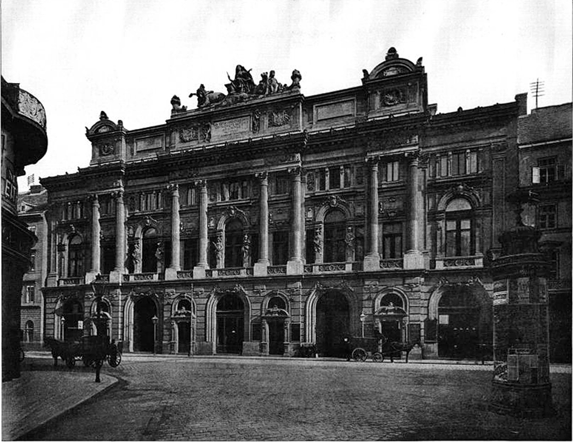 Wien, Taborstraße 10, Börse für landwirtschaftliche Producte (erbaut: 1887/90)